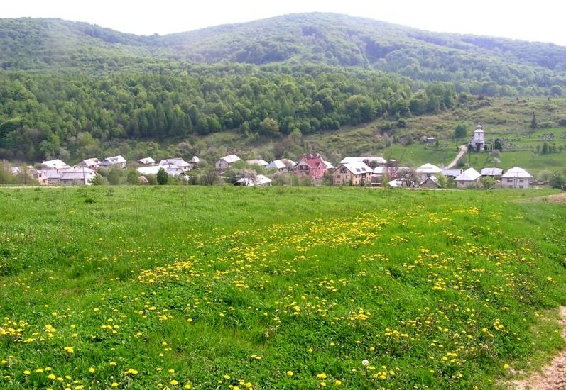 Celkový pohľad